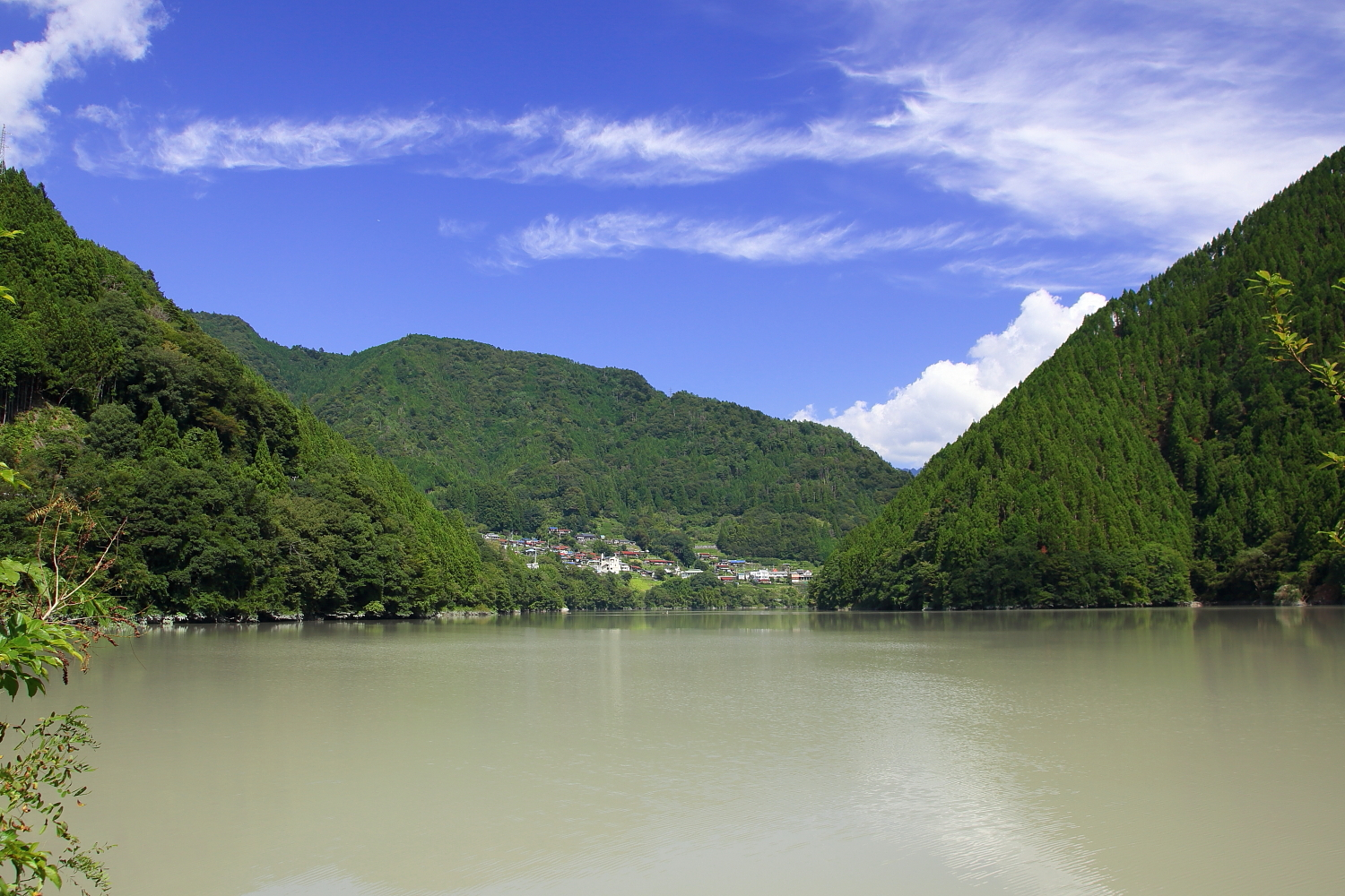 佐久間湖と富山地区遠景（豊根村富山、2011年（平成23年）9月）